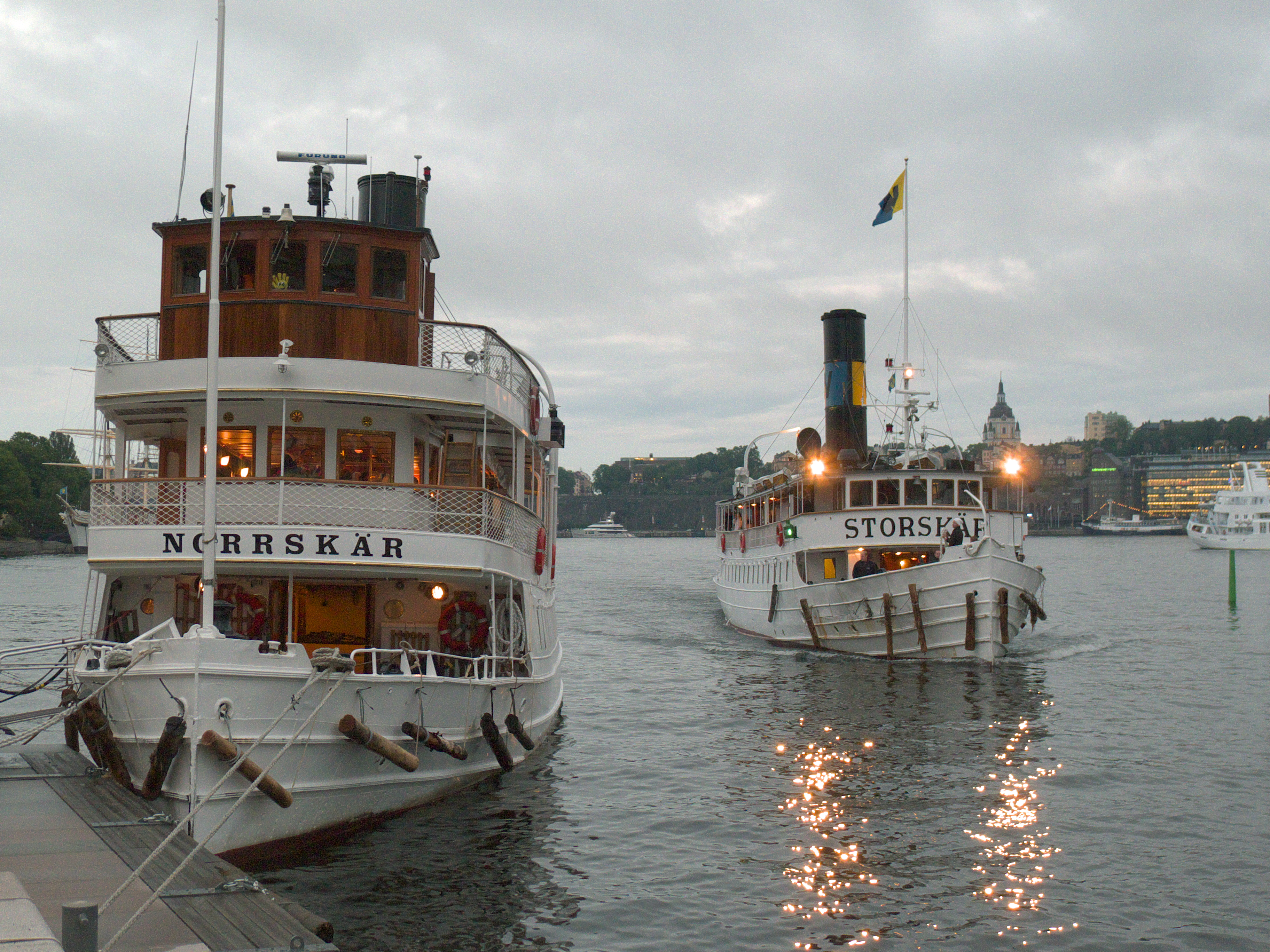 100-year-old steamers "Norrskär" and "Storskär" in Stockholm harbour.